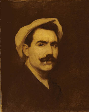 Leopoldo Garcia Ramon - Autorretrato